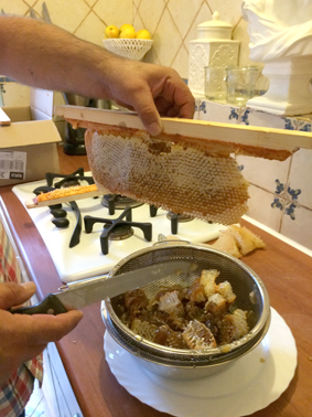 Recolte du mile à la main, un couteau découpe le rayon de miel au dessus d'une passoire. Un saladier récupère le miel qui coule en dessous.